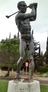 Escultura a la entrada de la Urbanización del Golf